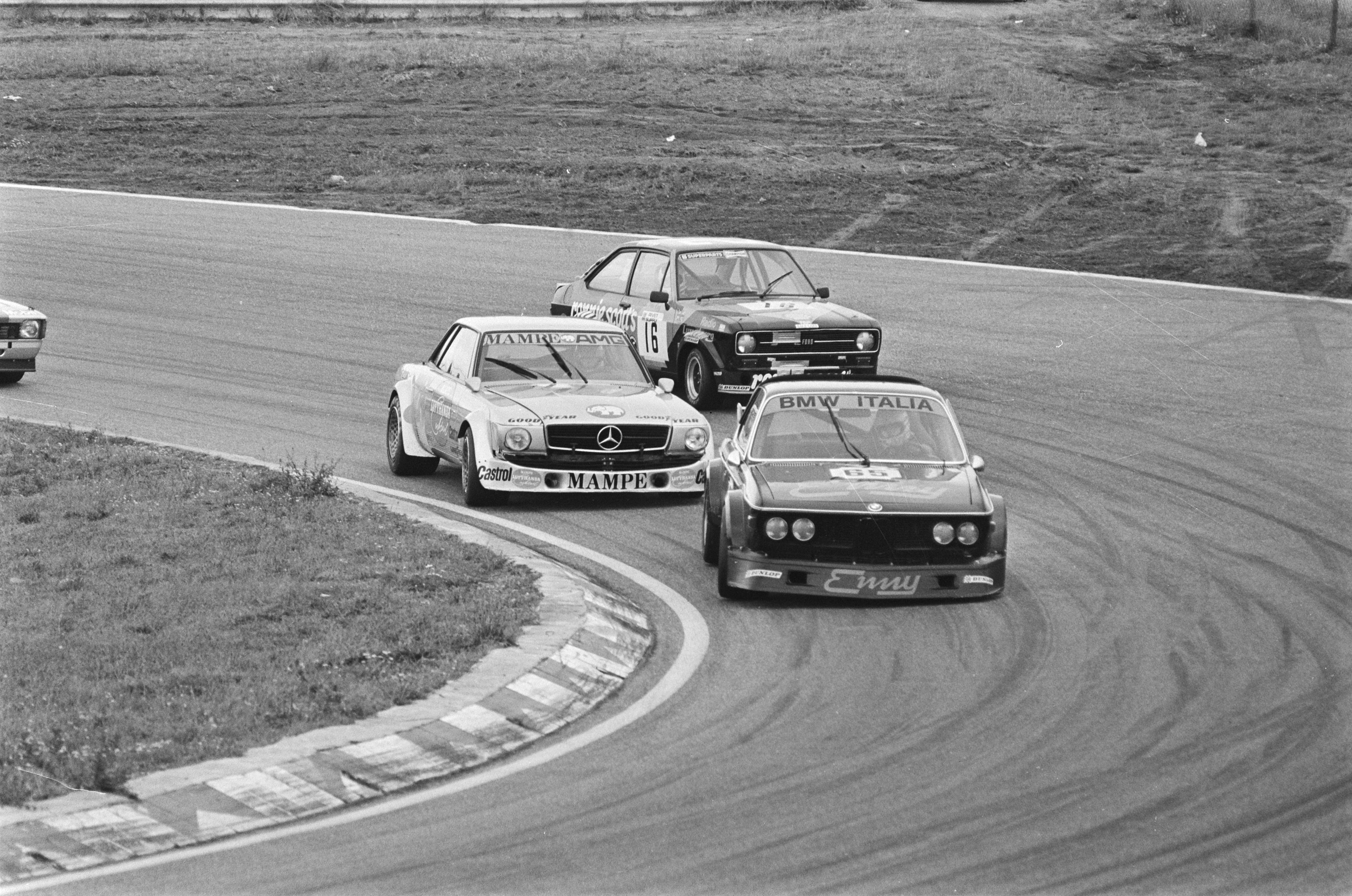 Collectie / Archief : Fotocollectie Anefo Reportage / Serie : [ onbekend ] Beschrijving : Zandvoort Trophy 4 uurs race ; op kop Toine Hezemans Datum : 6 augustus 1978 Locatie : Noord-Holland, Zandvoort Trefwoorden : autoraces Fotograaf : Peters, Hans / Anefo Auteursrechthebbende : Nationaal Archief Materiaalsoort : Negatief (zwart/wit) Nummer archiefinventaris : bekijk toegang 2.24.01.05 Bestanddeelnummer : 929-8454